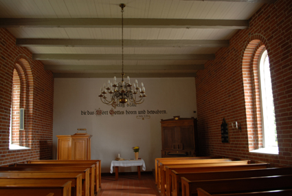 Kirche in Gandersum